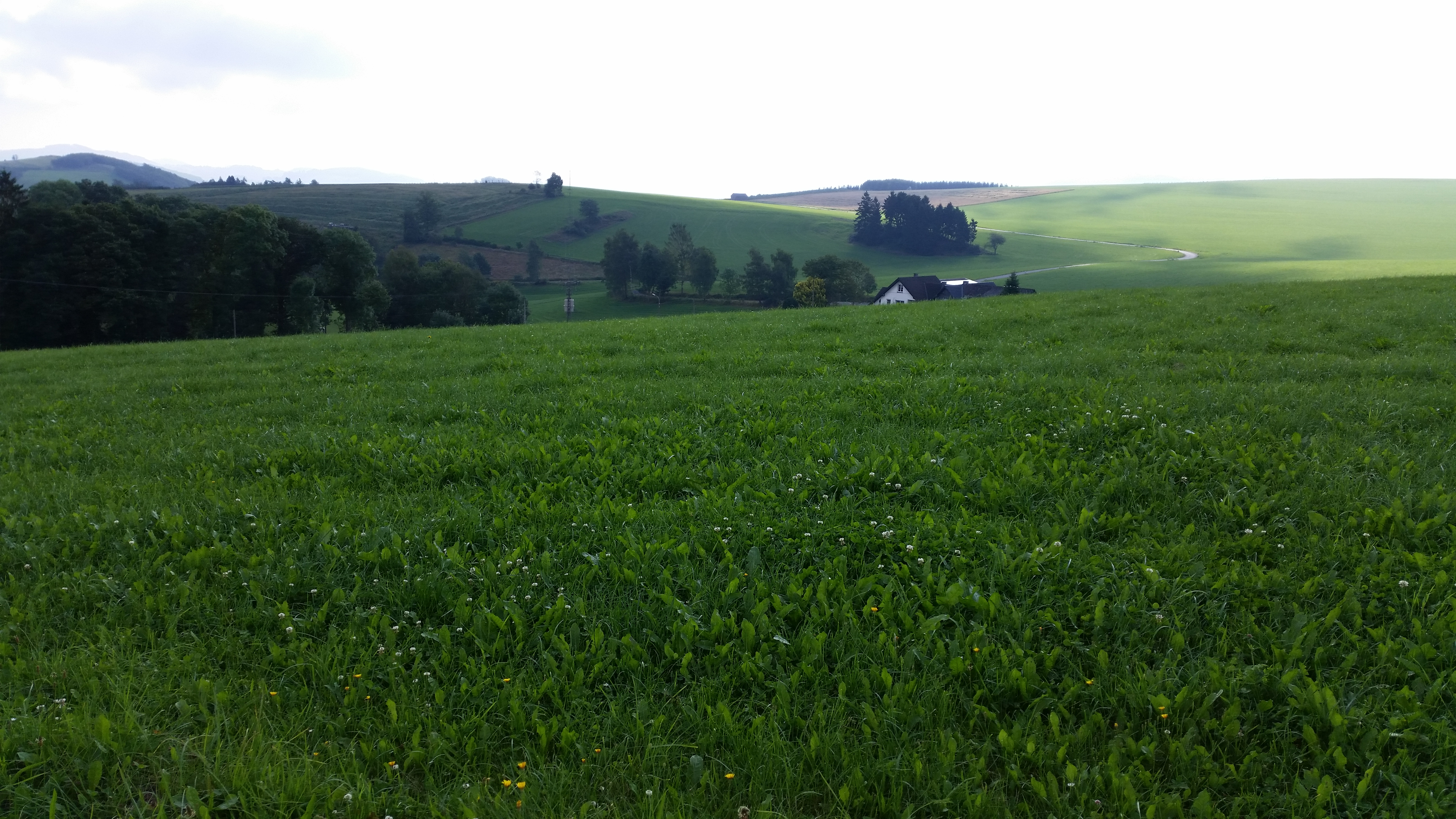 Landschaftsschutzgebiet Grünlandkomplex um Oesterberge; Eslohe-Oesterberge, Germany